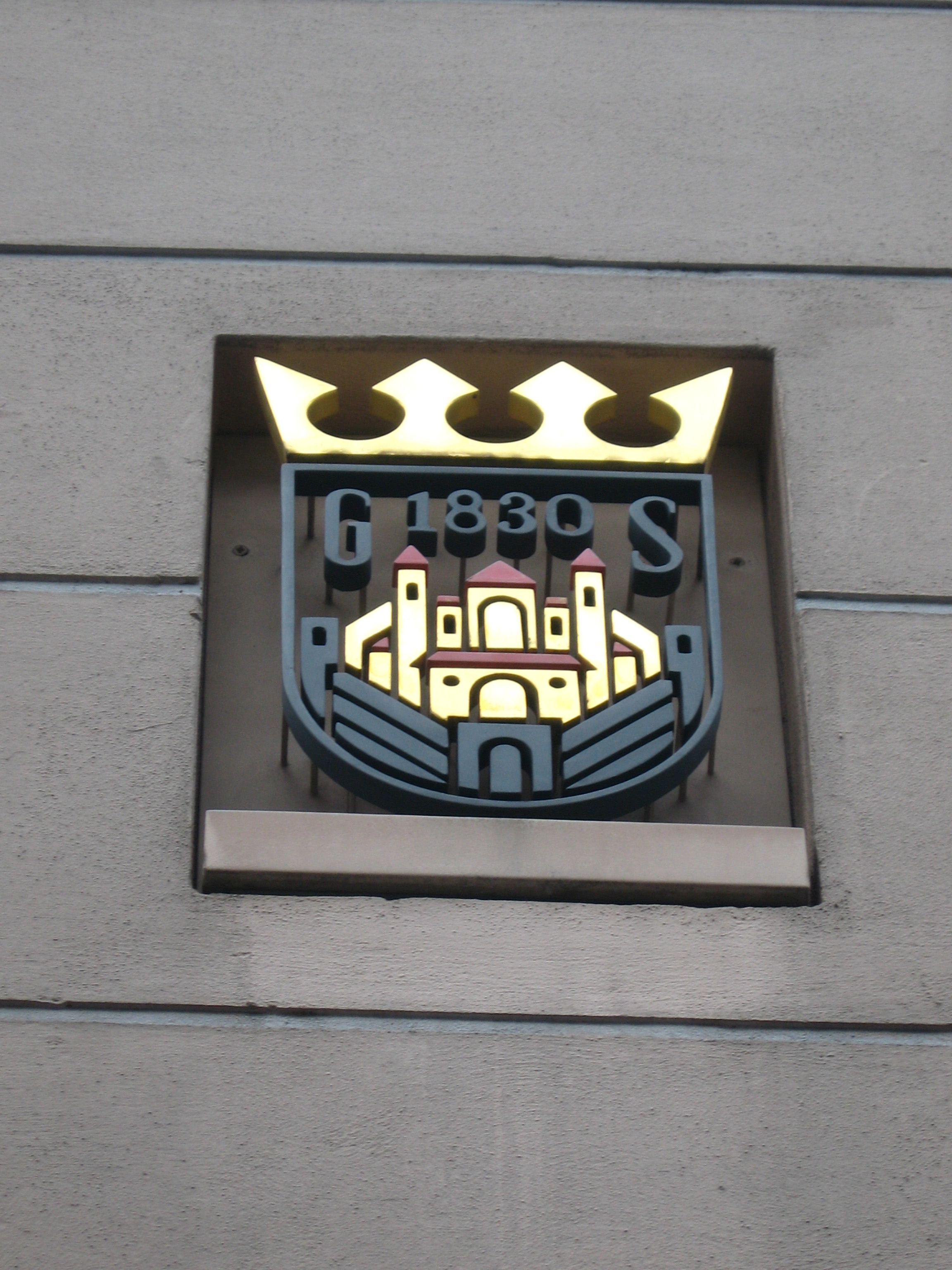 Kölns ältestets Muschelhaus "Bieresel" (Gaststätte seit 1297) Datum: 21.01.2011 Urheber: B. Neulich alias Benutzer:Neulich im Roxy Kino Quelle: Privates Fotoarchiv des Urhebers